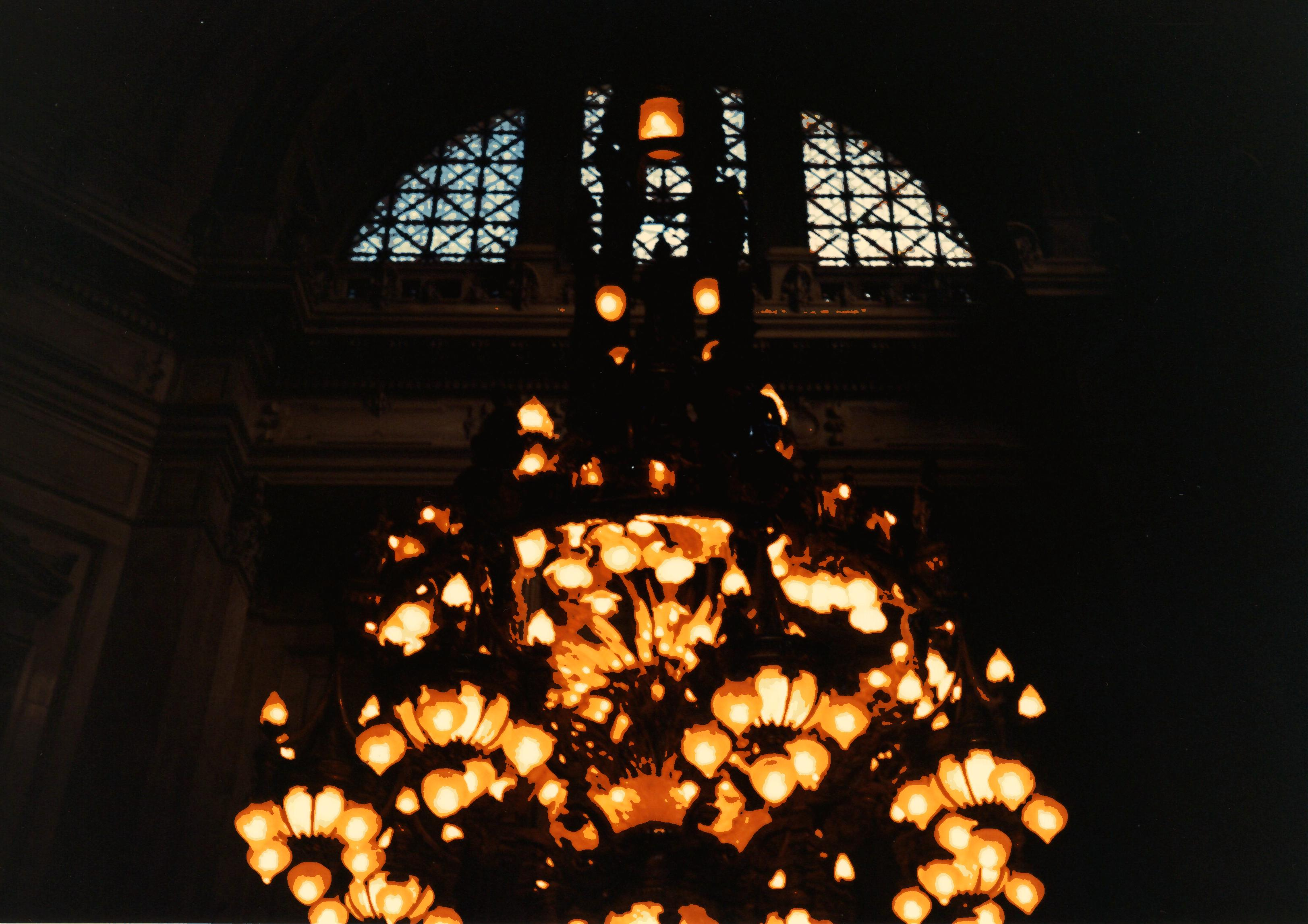 Araña ubicada en el interior del Congreso de la Nación Argentina